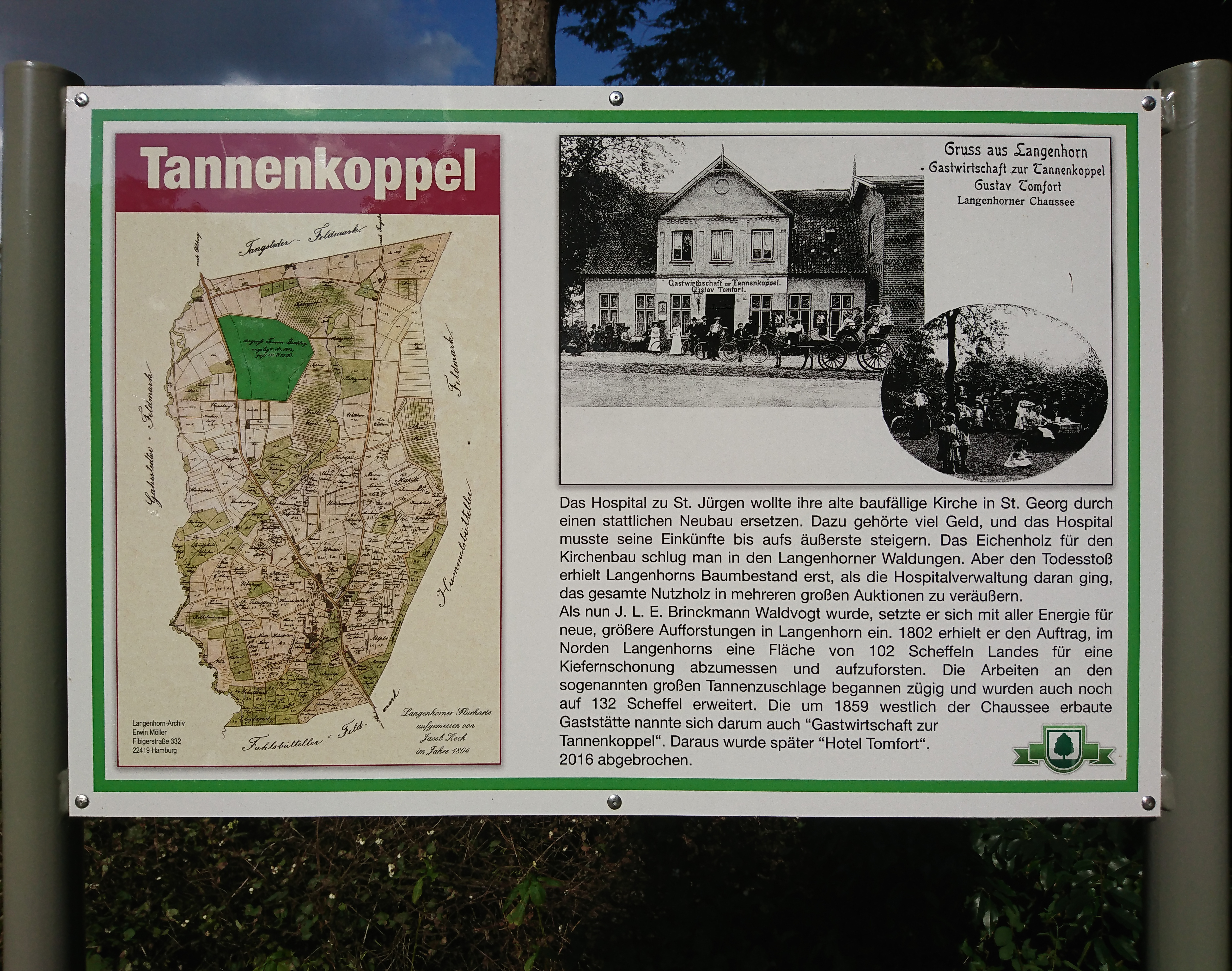 Schild an der Henny-Schütz-Allee, nahe der Langenhorner Chaussee. Aufgestellt ca. August 2017. Es ist eines von drei aufgestellten Schildern (mit unterschiedlichem Inhalt) in Hamburg-Langenhorn, die an die Tannenkoppel erinnern. Quelle: Langenhorner Rundschau (PDF-Datei), September 2017, S. 4–5. Das Wappen unten recht ist das des Quartieres Unter den Linden Hamburg, der Patrizia Immobilien AG, auf dem ehemaligen Gelände des Krankenhauses Ochsenzoll, bzw. der Tannenkoppel. Die Patrizia Immobililien AG unterstützte die Realisation, der Aufstellung der drei Schilder.